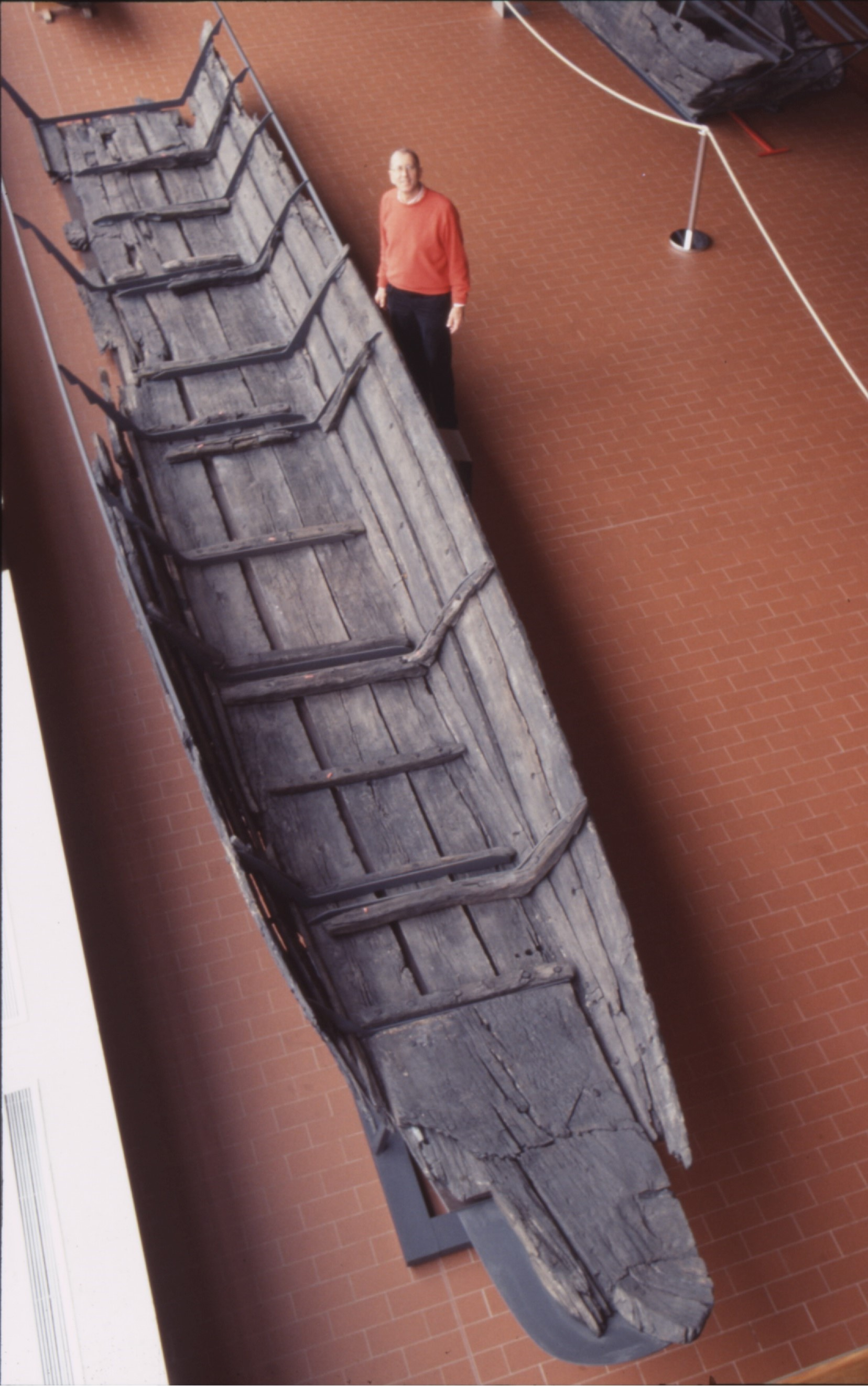 In Bremen 1989 archäologisch geborgenes Flussschiff aus karolingischer Zeit. Foto während der Konservierung im Deutschen Schiffahrtsmuseum, um 2002.